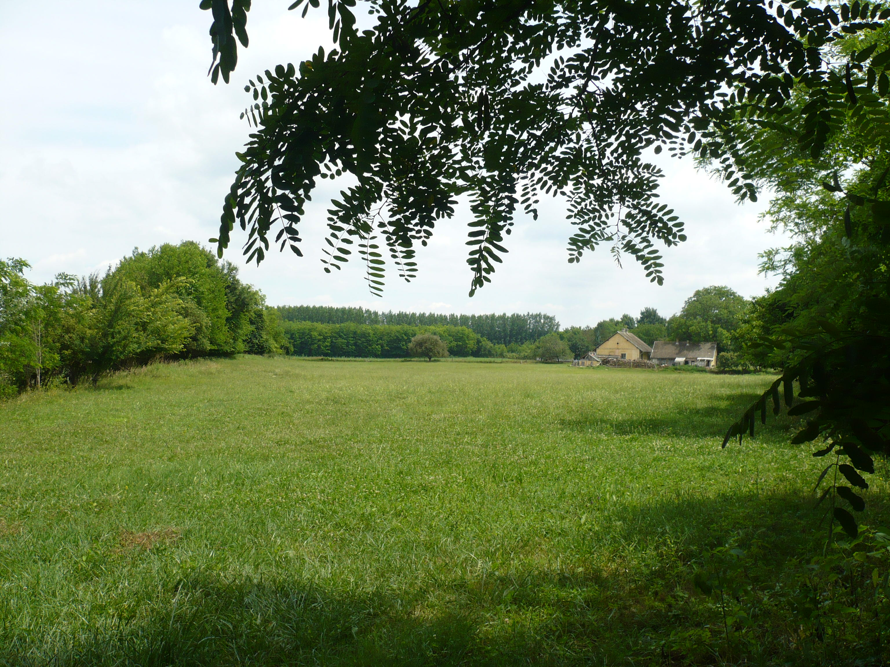 Kengyiai tanya (Szerbia)